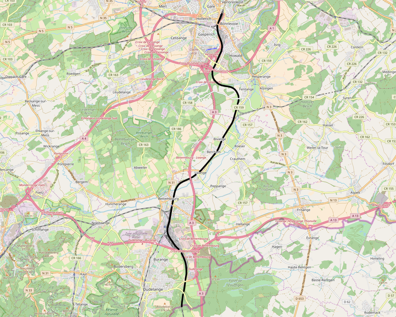 CFL line 6, Luxembourg - Bettembourg